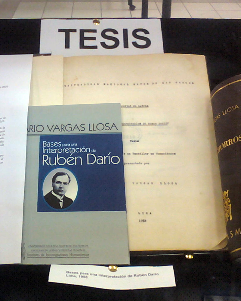 Tesis de pregrado "Bases de una interpretacion de Ruben Dario", para la Universidad Nacional Mayor de San Marcos, de Mario Vargas Llosa.